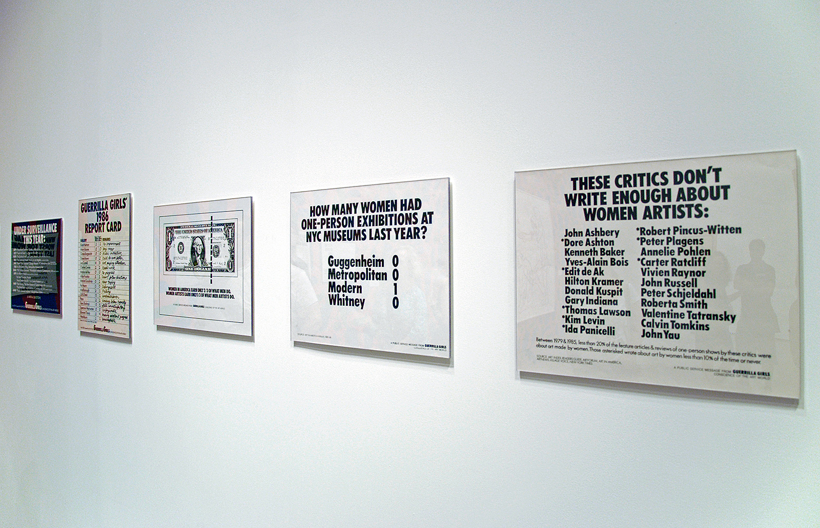 Oeuvres des Guerrilla Girls exposer au Museum of Modern Art (MoMA).